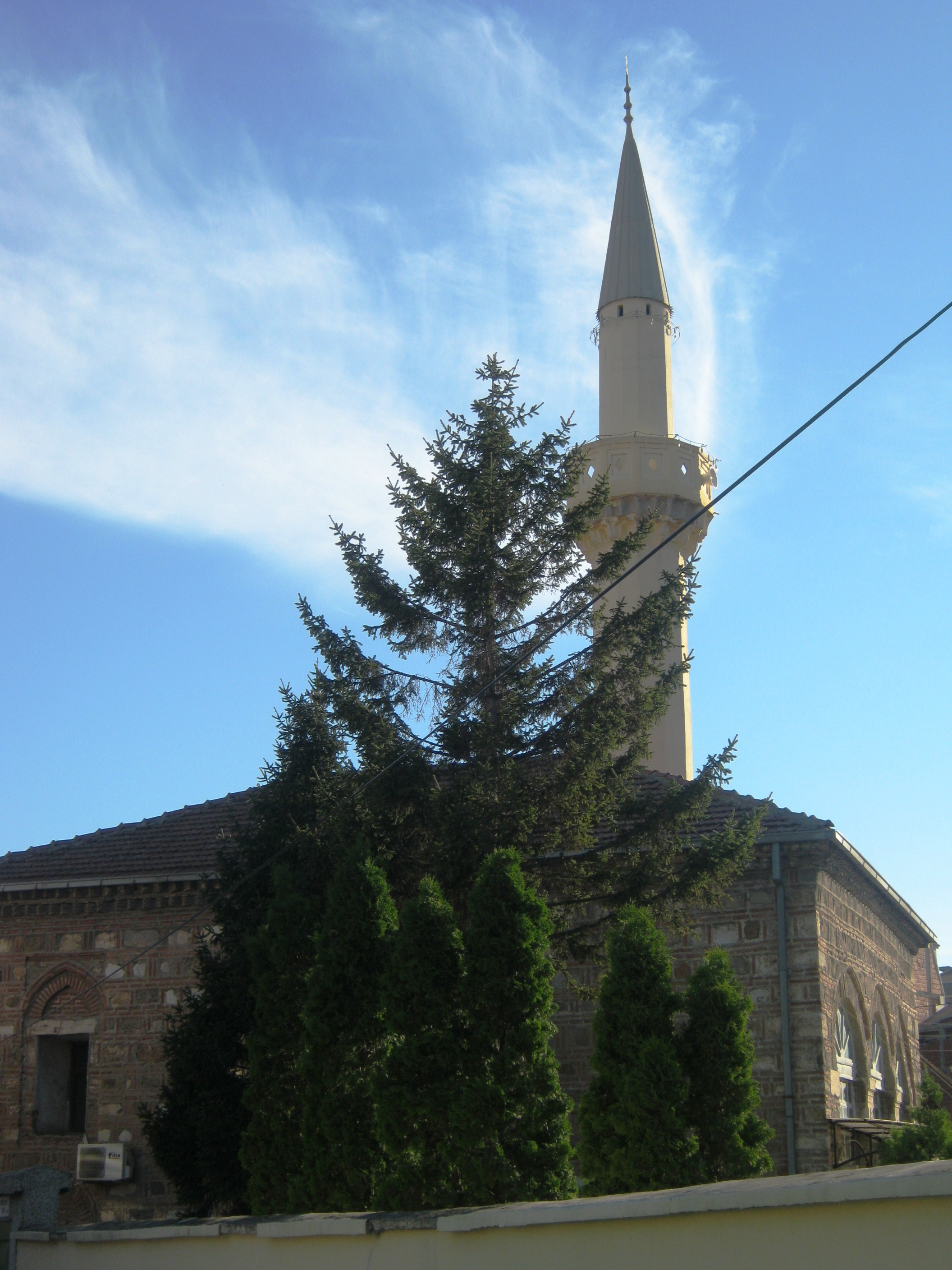 Џамија Хаџи Балабан во Скопје